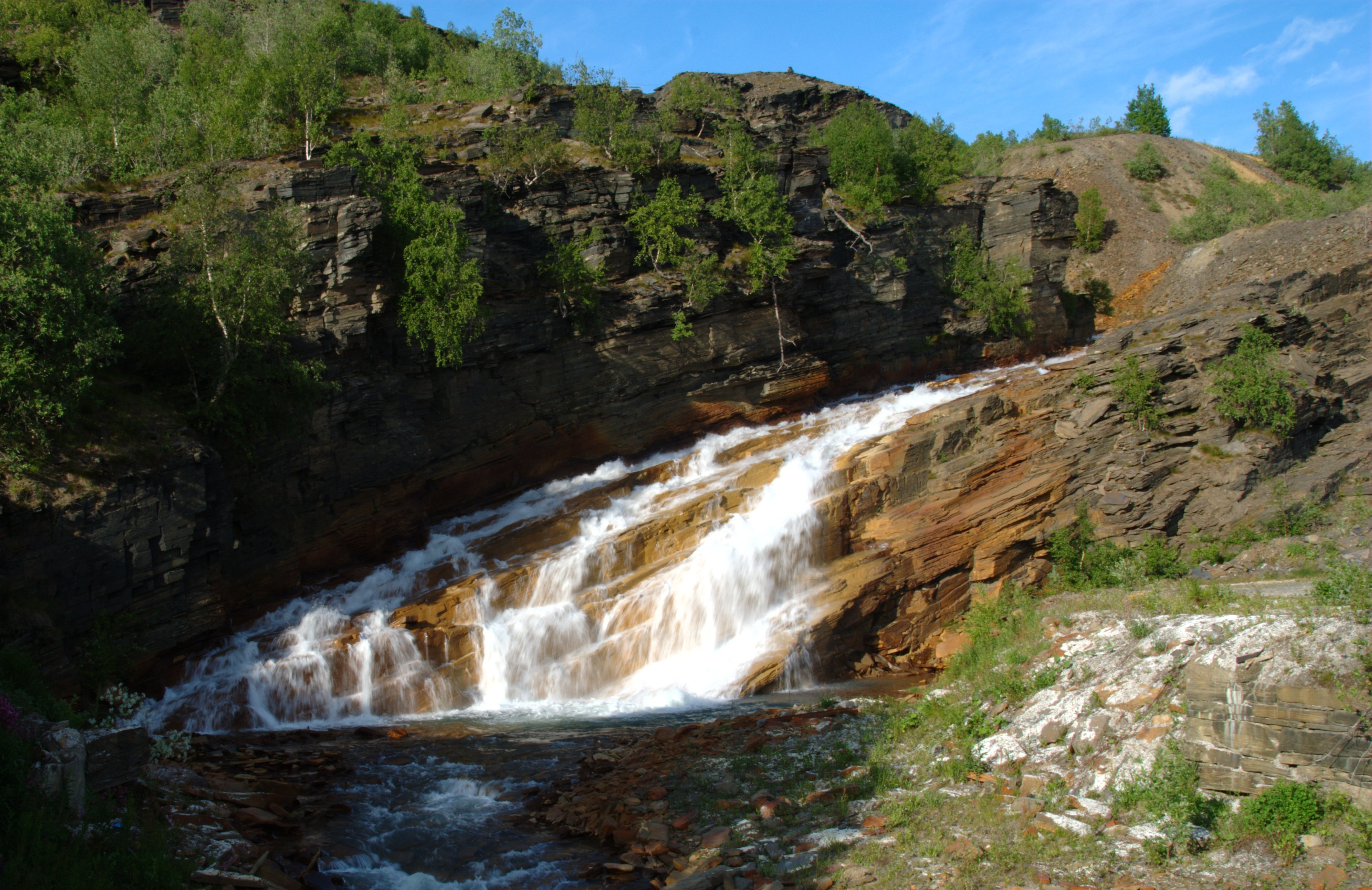 Rupsielva